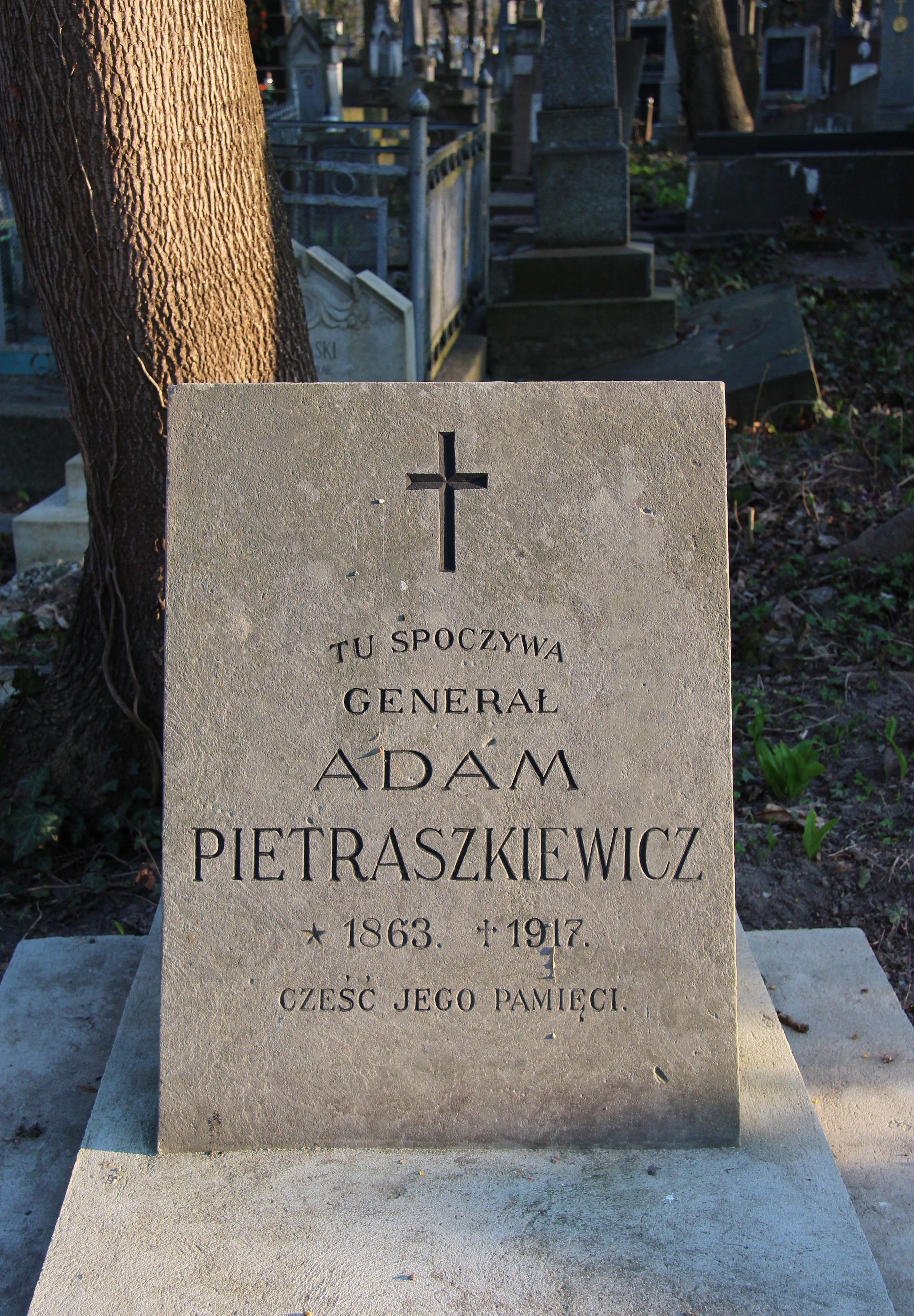 Надгробок на могилі генерала А.П'єтрашкевича. Личаківський цвинтар , поле № 57.